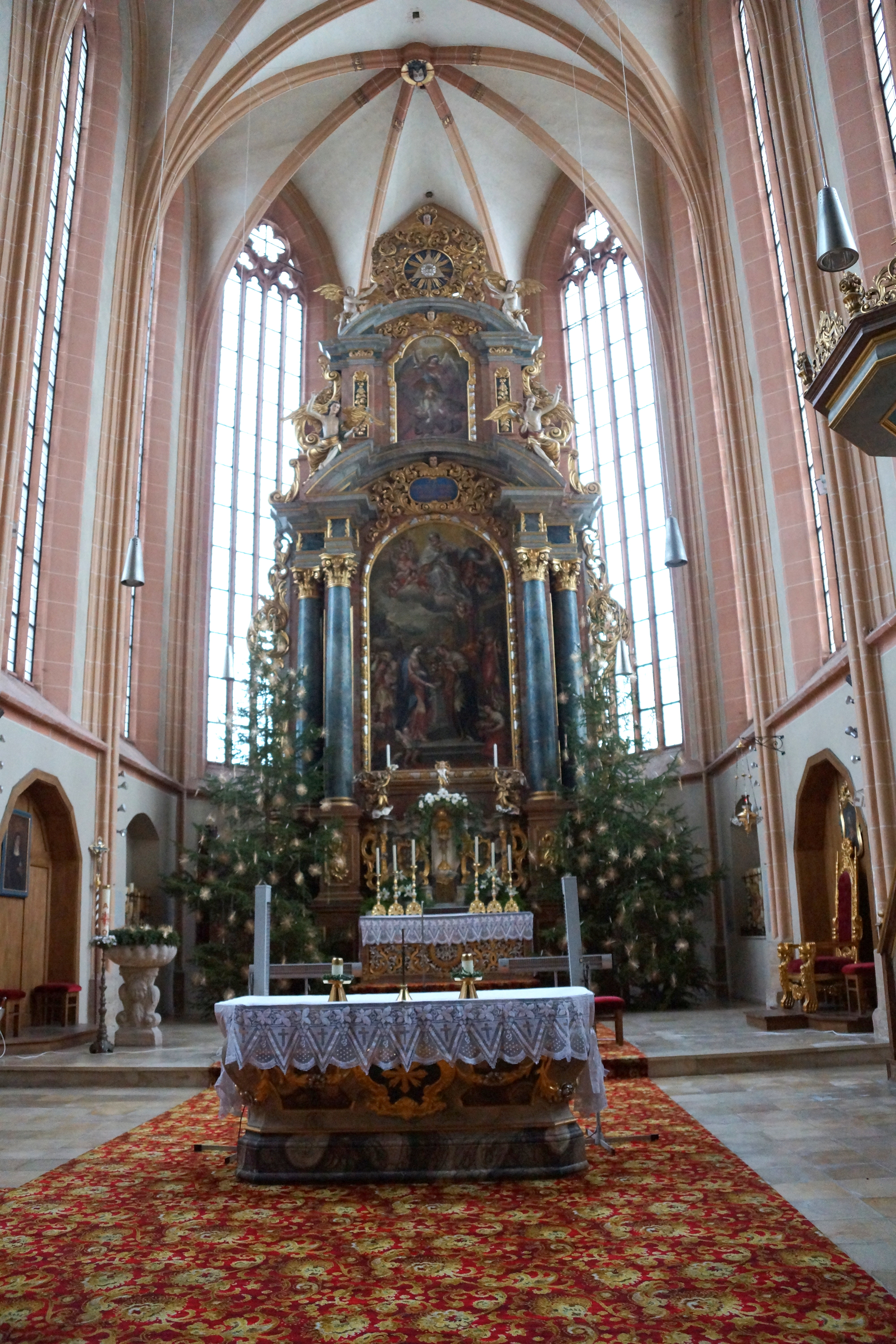 Kloster Seligenporten (Kreis Neumarkt in der Oberpfalz)